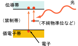 光電効果の説明